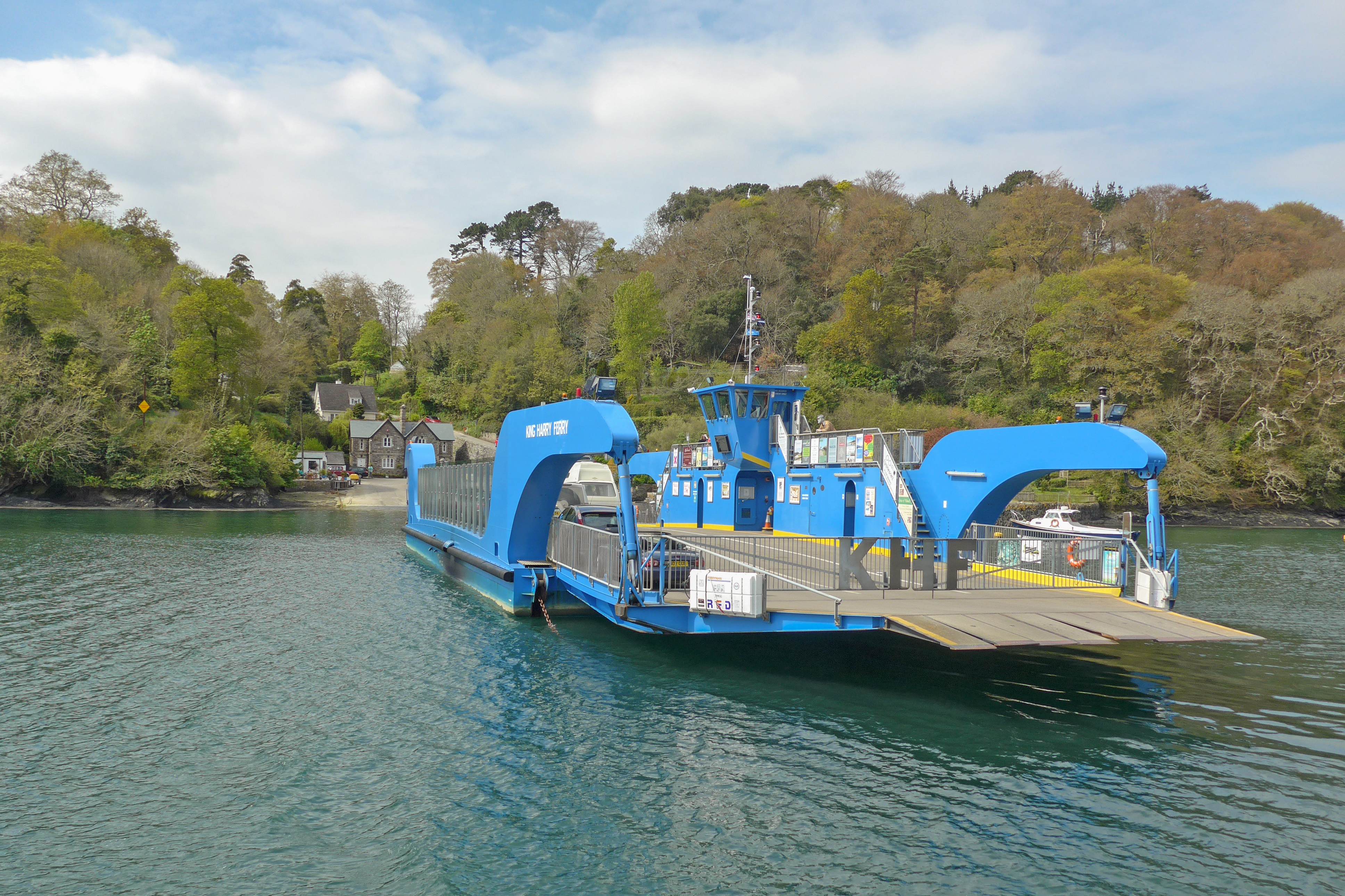 River Fal